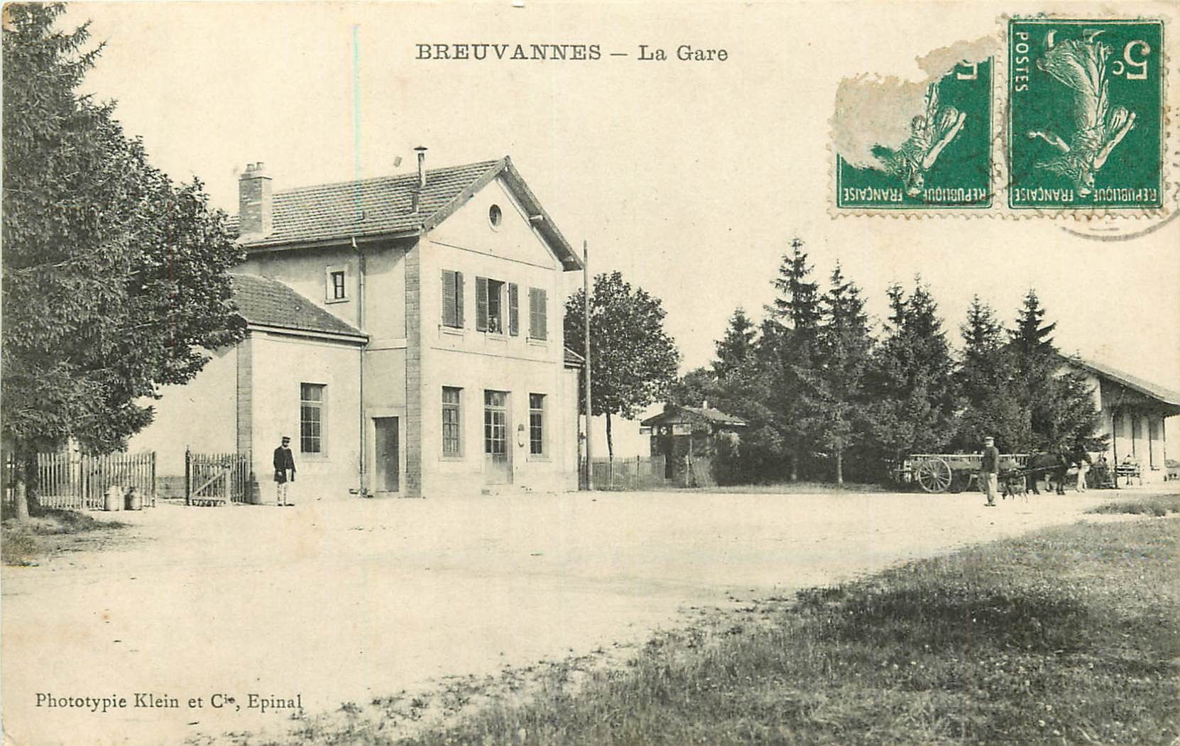 La gare vers 1910